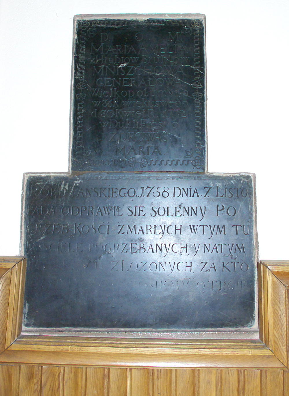 dwie tablice franciszkanie sanok